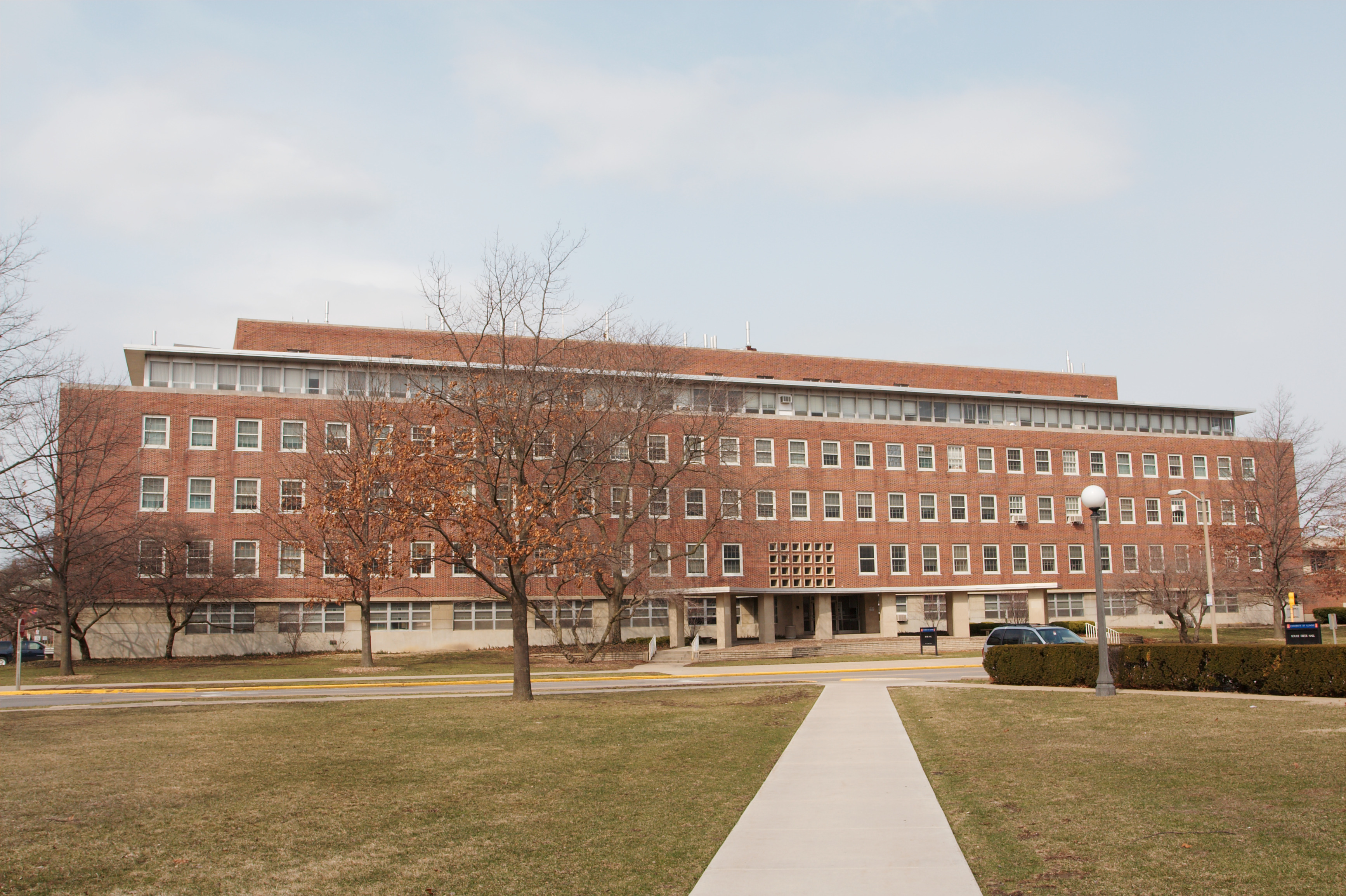 Bevier Hall, Urbana, IL